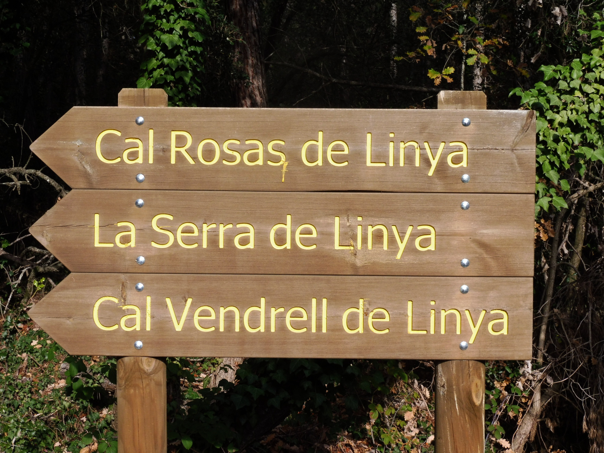 Cal Rosas de Linya (Navès): rètol indicador